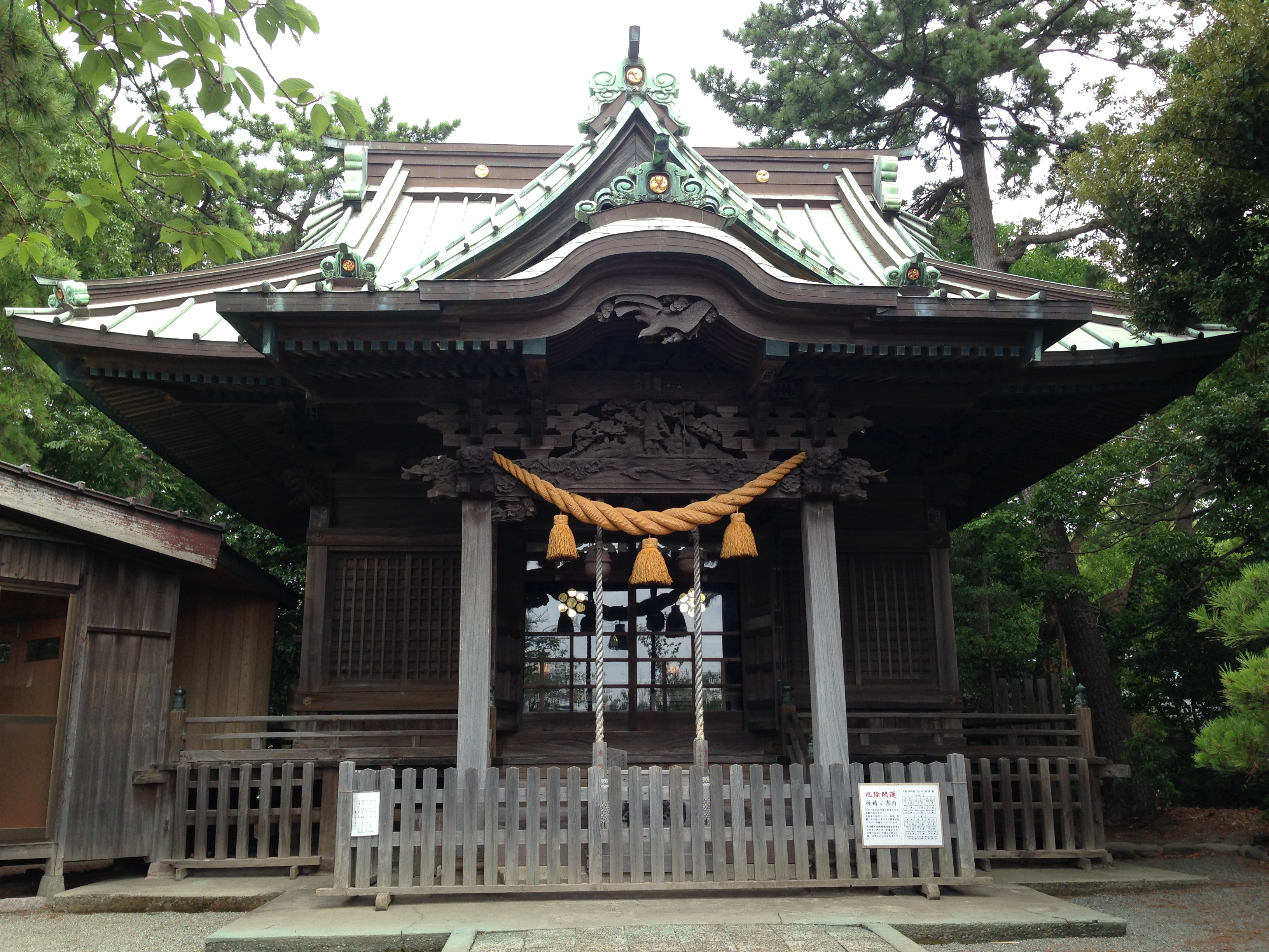 神奈川県茅ヶ崎市にある第六天神社の社殿。